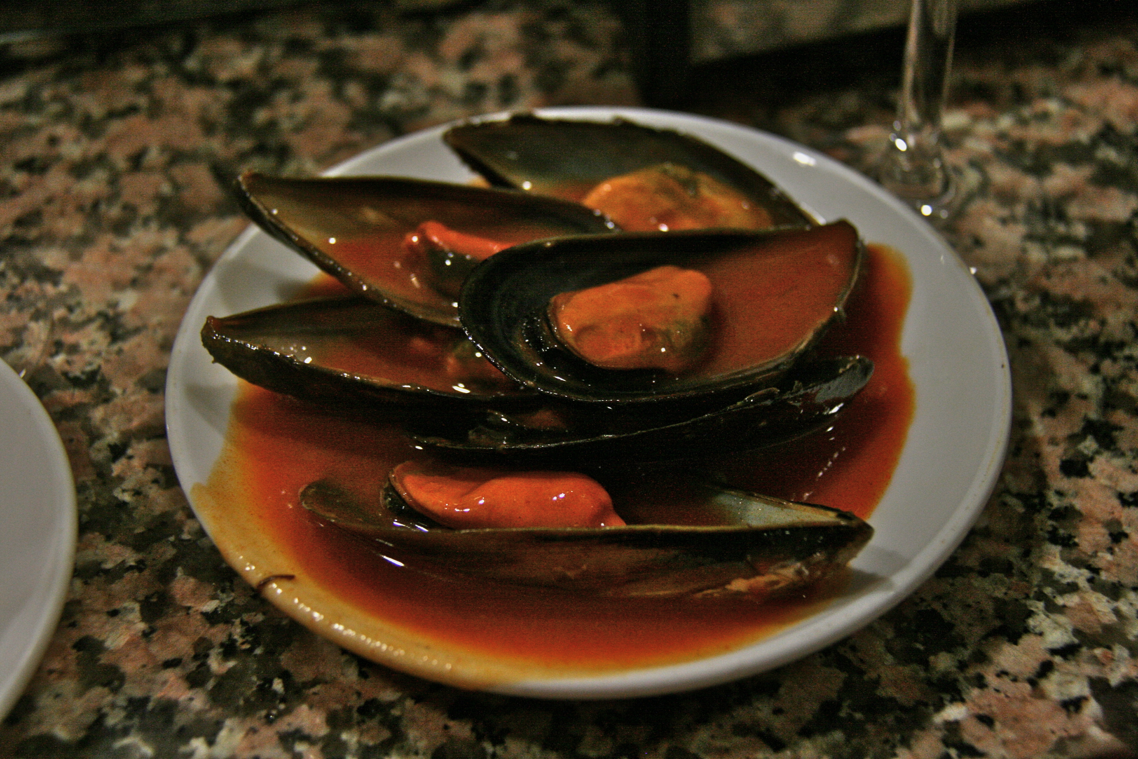 Tiberios (Zamora) - Mejillones en salsa de tomate